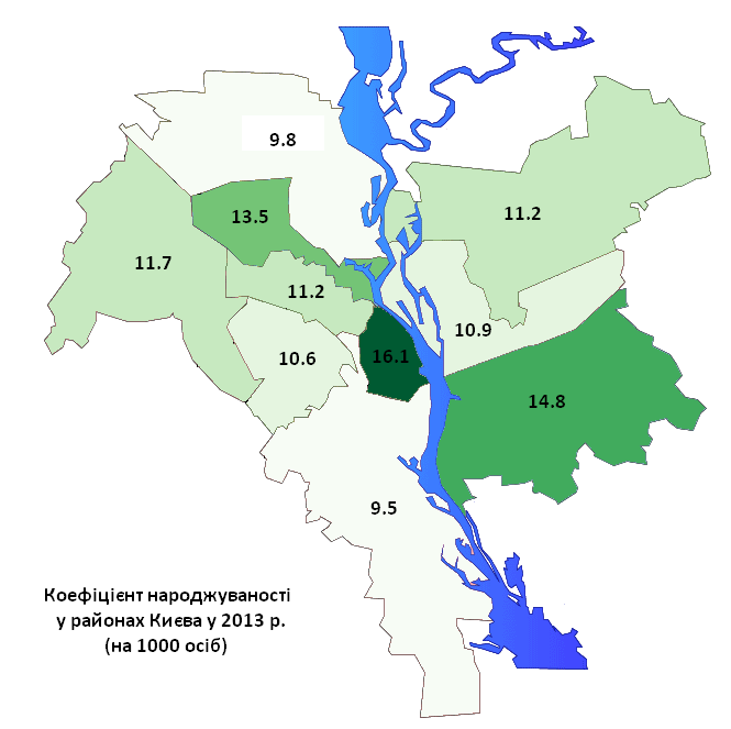 Коефіцієнт народжуваності населення районів Києва у 2013 р. (на 1000 осіб) / Population birth rate in raions of Kyiv in 2013 (per 1000)